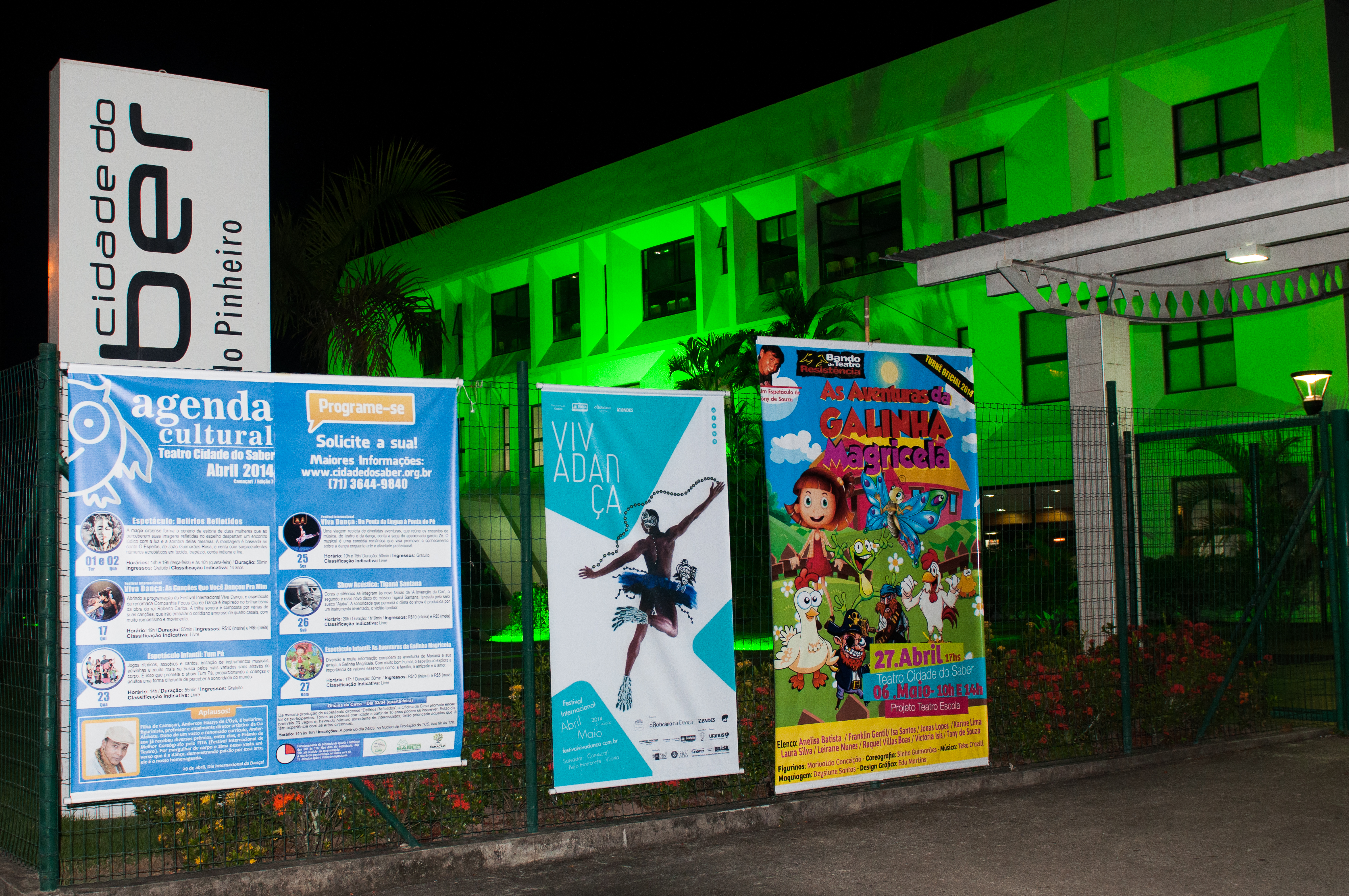 Espetáculo: As Canções Que Você Dançou Pra Mim Data: 17 de abril de 2014 Local: Teatro Cidade do Saber, Camaçari Créditos: Bruno Santos / Labfoto